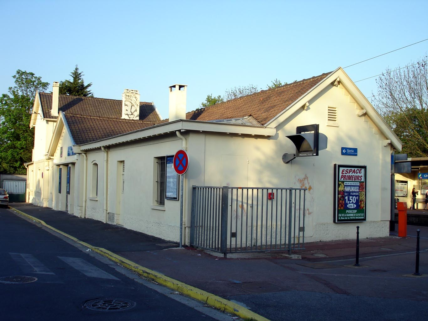 Gare de Groslay à Groslay (Val-d'Oise), France